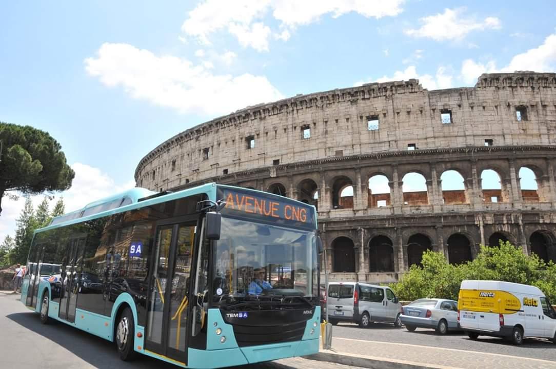 Presentazione a Roma del nuovo bus Temsa Avenue